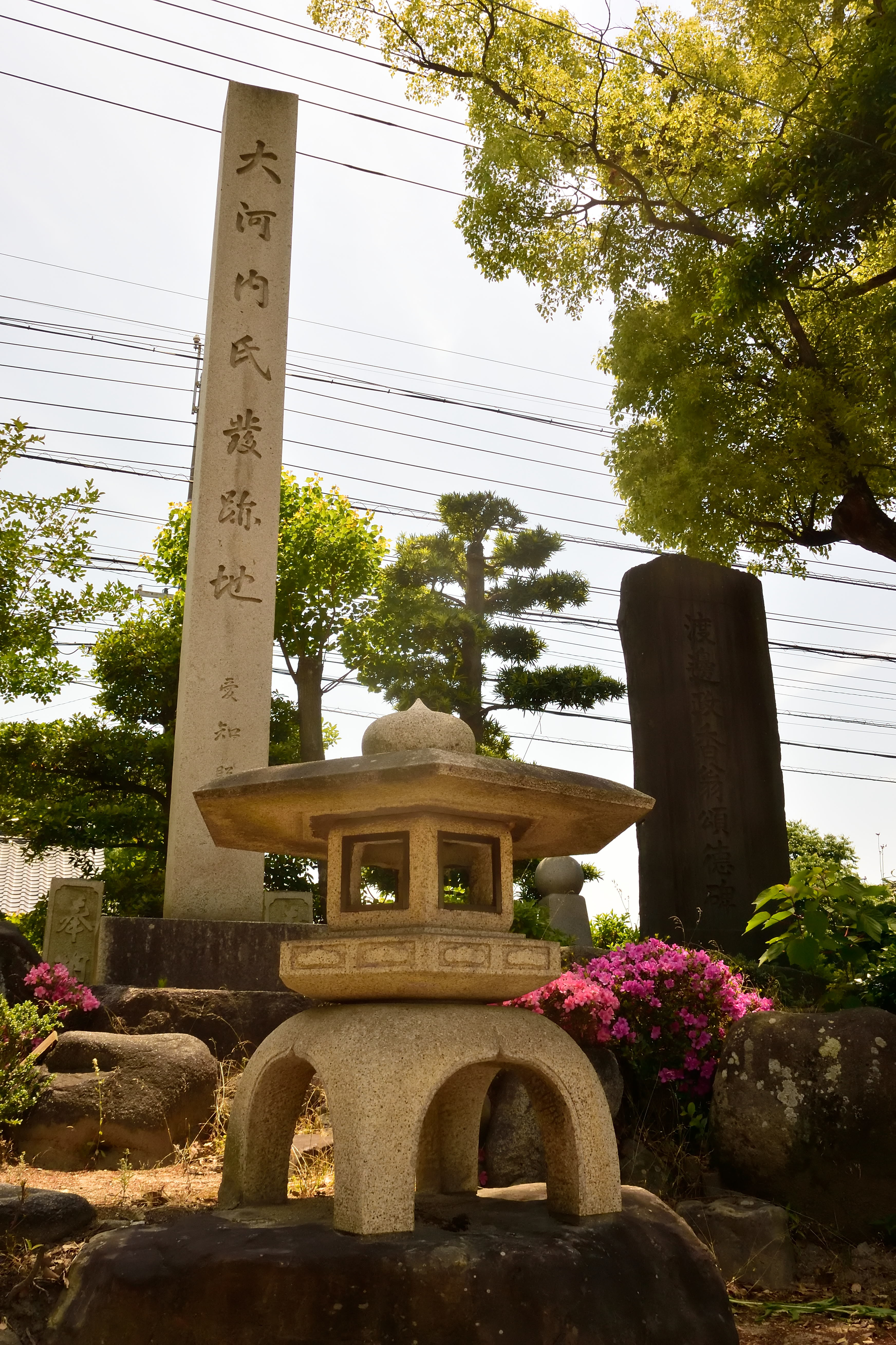 寺津八幡社石碑